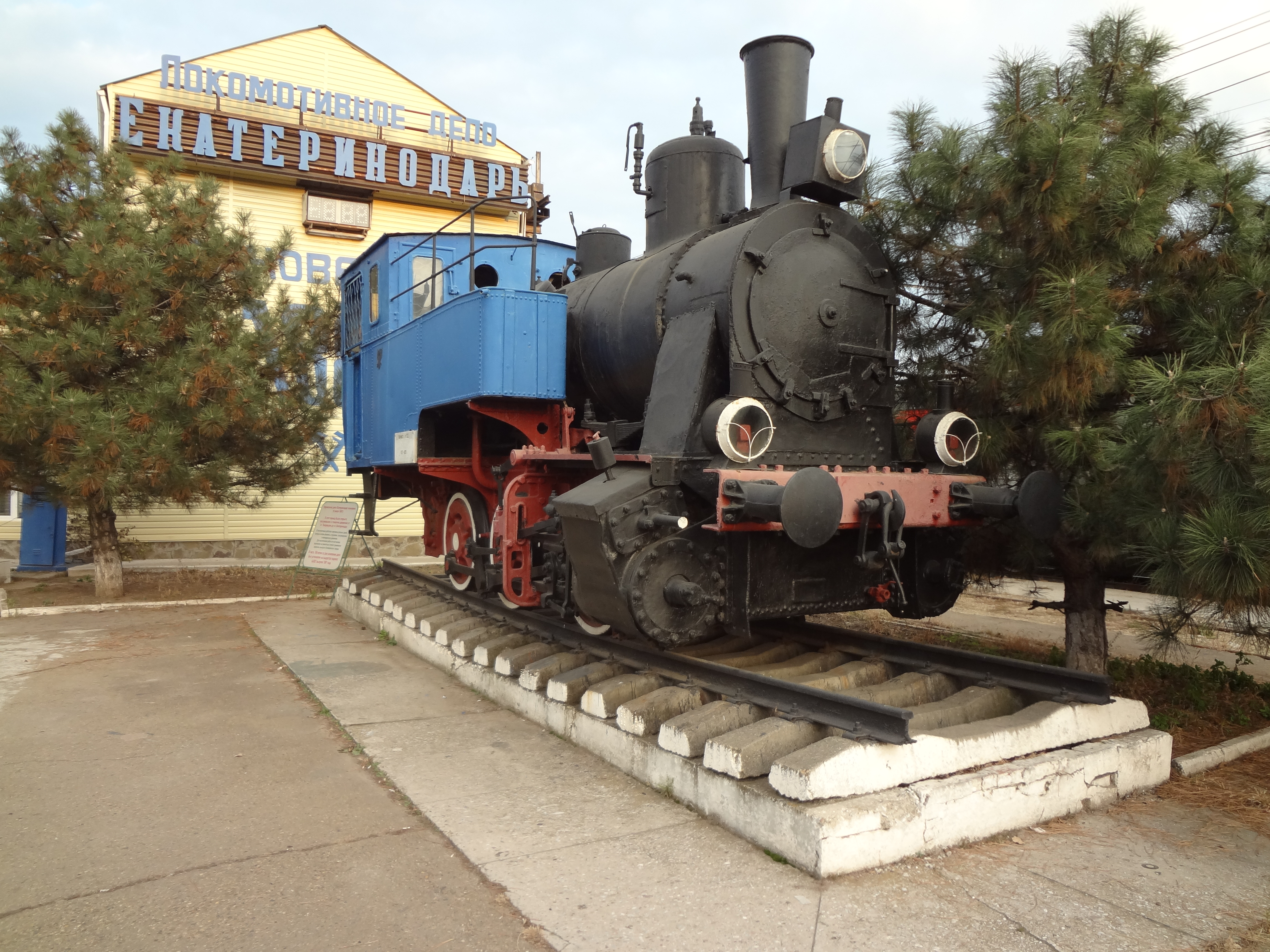 Паровоз-памятник Ь-2021 (первый паровоз Екатеринодарской железной дороги) перед локомотивным депо Краснодар (вблизи вокзала Краснодар-I).